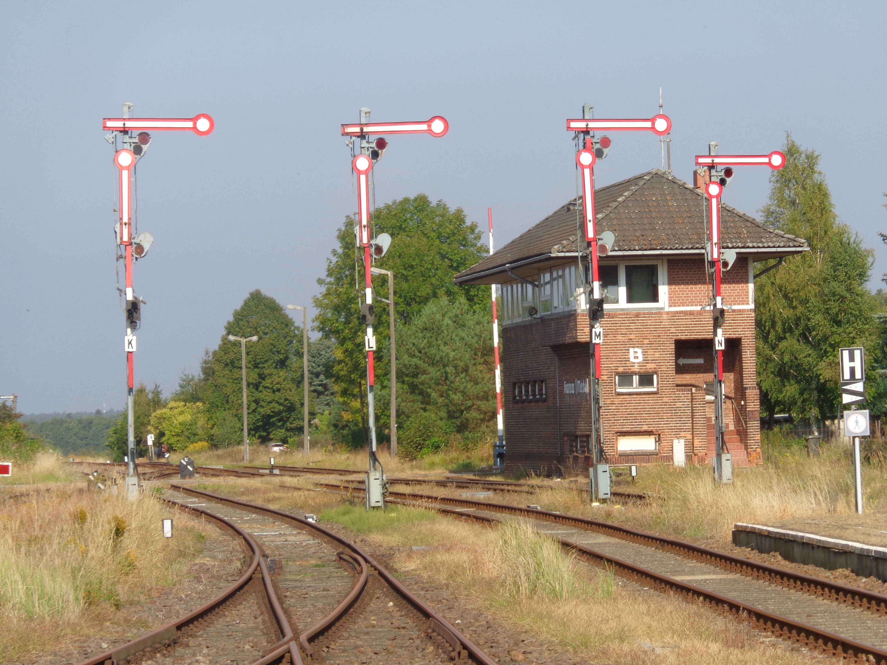 Ausfahrtsignale am Nordende des Bahnhofs Karow (Meckl)